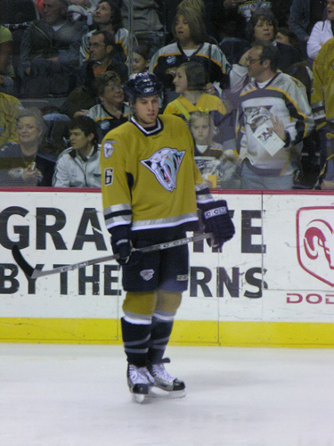 Bild zeigt Shea Weber von den Nashville Predators